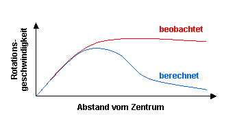 Diagramm zur Entdeckung der Dunklen Materie